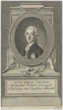 Porträt des badischen Hofratspräsidenten August Johann von Hahn